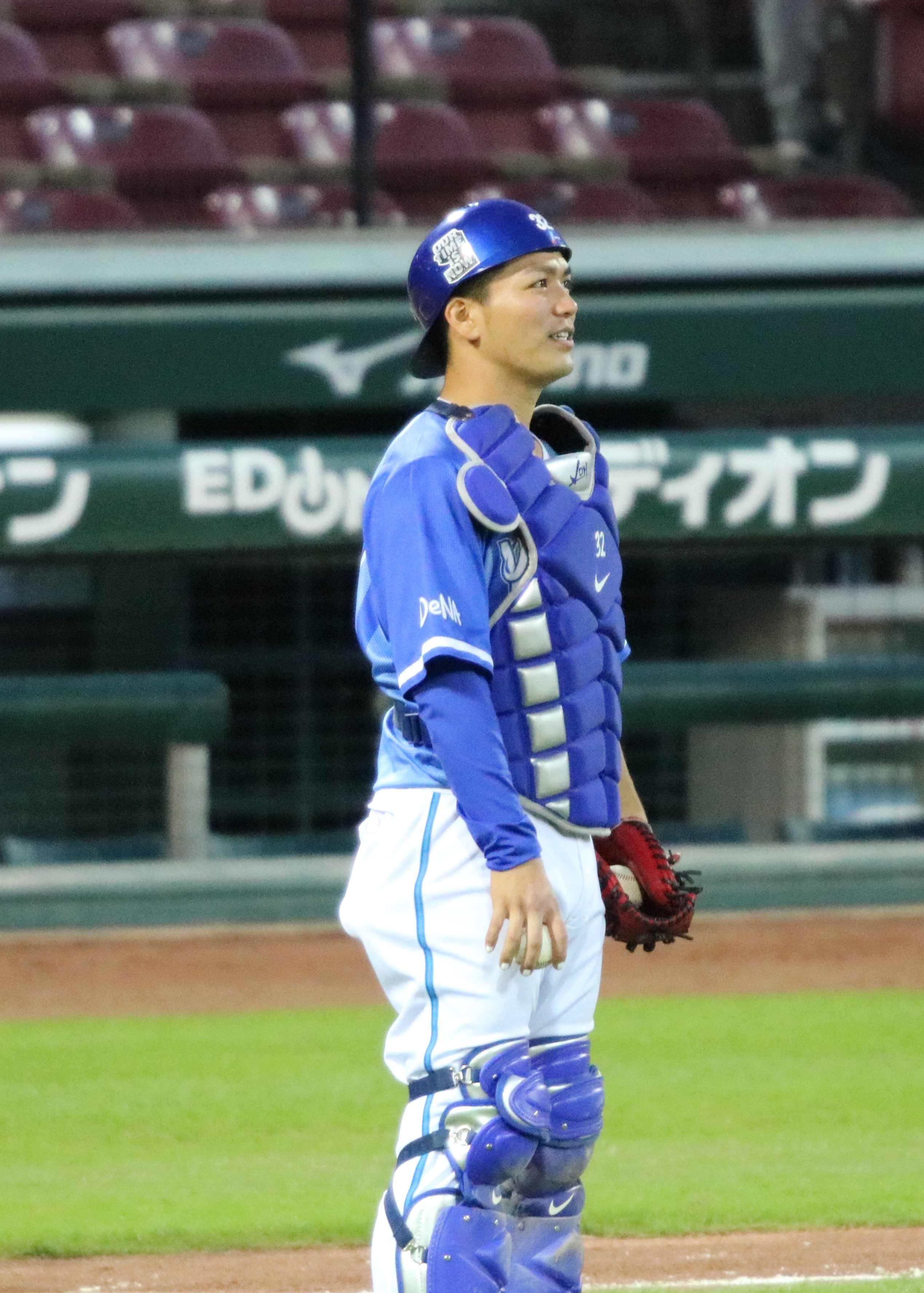 2017/10/24マツダスタジアム